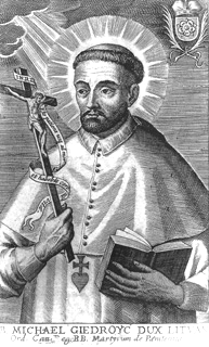 Miachał Giedroyć